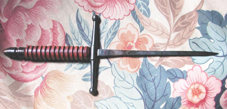 Quadrello di fabbricazione moderna